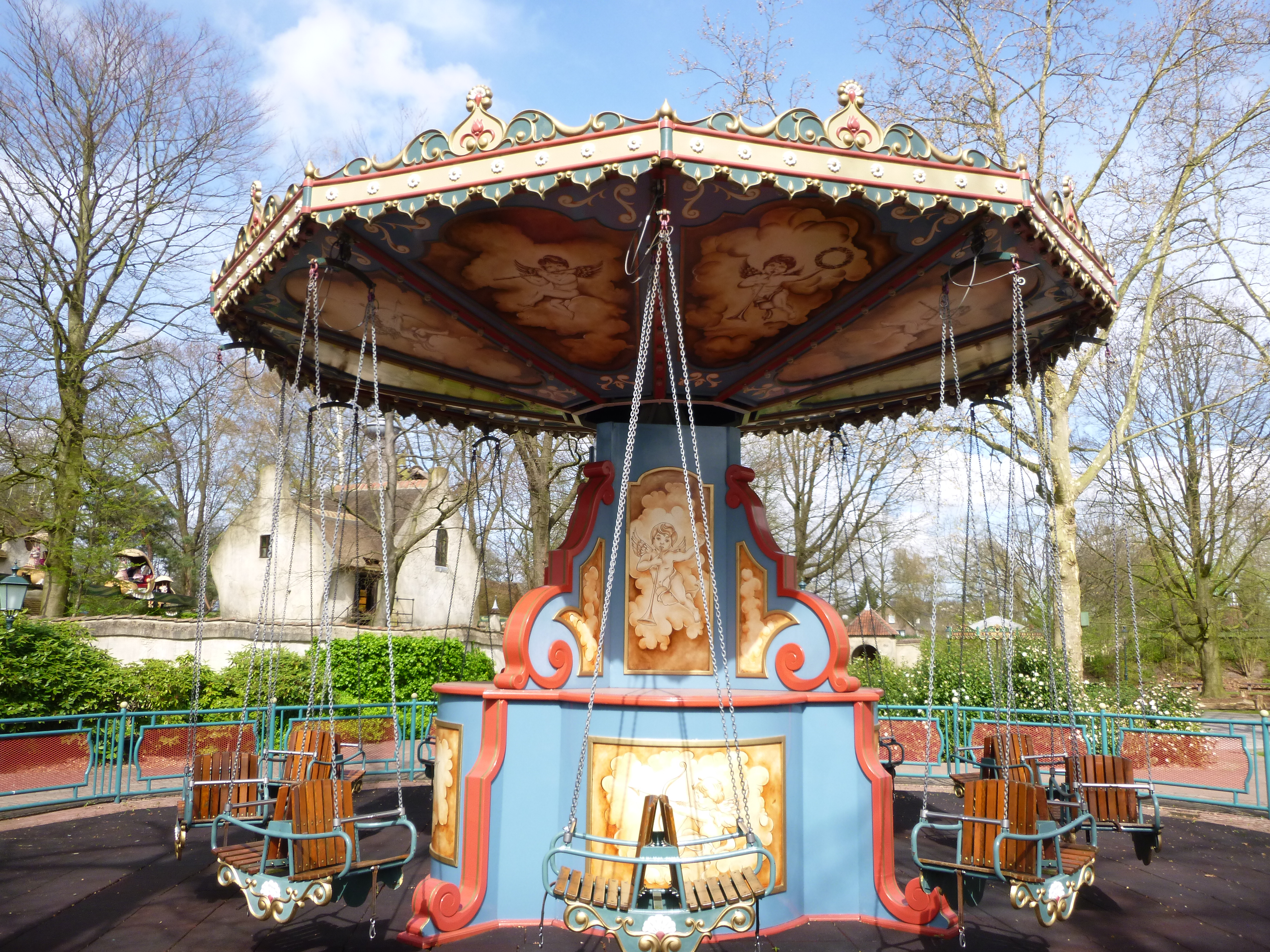 Petit carrousel à chaines Efteling